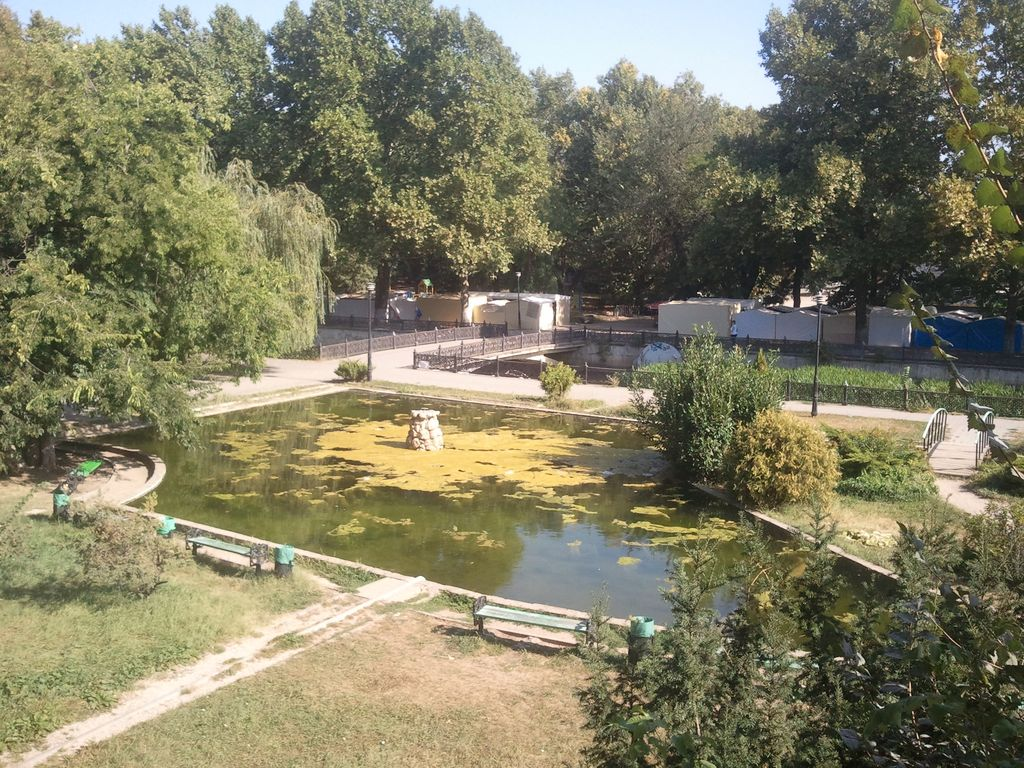 Центральная площадка парка. Сентябрь 2018 года.